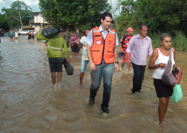 Prefeito de Rio Branco, Marcus Alexandre visita bairro afetado por alagamentos